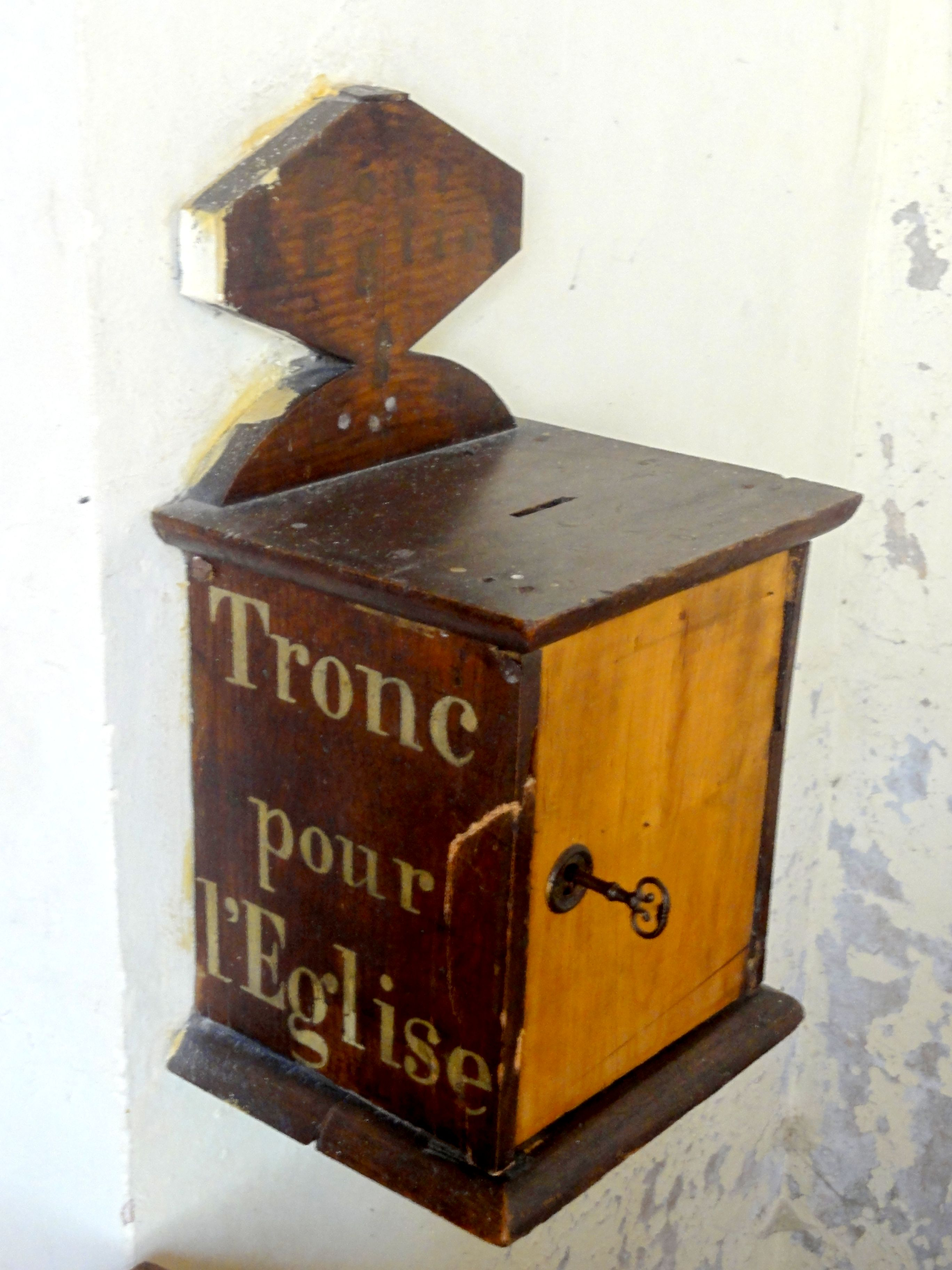 Nef, tronc.